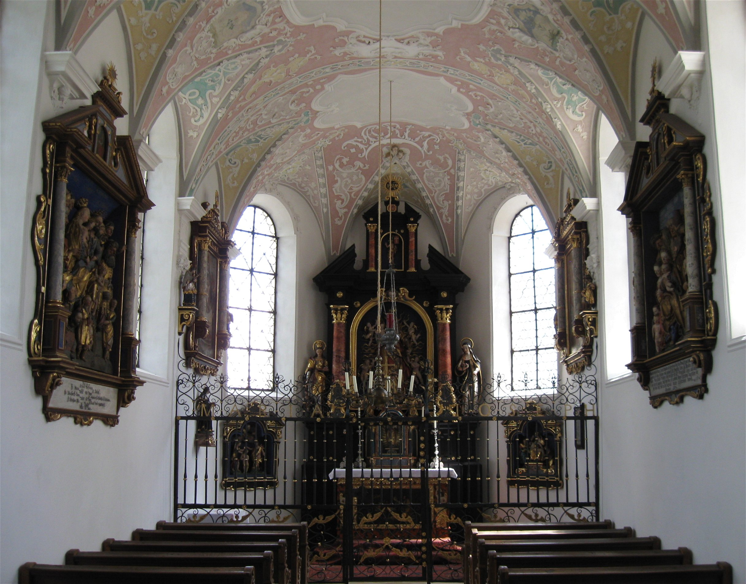 Memminger Straße 9; Katholische Liebfrauenkapelle, Kapelle des ehem. Leprosenhauses, Saalbau mit dreiseitigem Schluss, Dachreiter mit Haubendach und östlicher Brunnenkapelle, im Kern um 1455, Umgestaltung Mitte 17. Jahrhundert und 1725; mit Ausstattung; Verbindungsbau zum Leprosenhaus, zweigeschossiger Satteldachbau mit Oratorium und Franziskusgrotte, 17. Jahrhundert. D-7-78-173-112